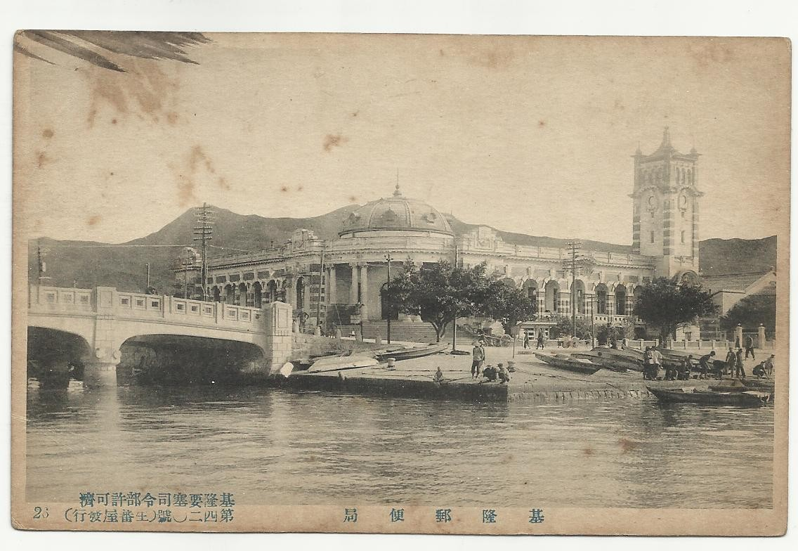 基隆郵便局即現今基隆郵局的所在地，但原建物已於1960年代拆除。在左方的橋樑是日新橋，位置在現今的富狗橋。 基隆要塞司令部許可済 第四二O號(生蕃屋發行) 26